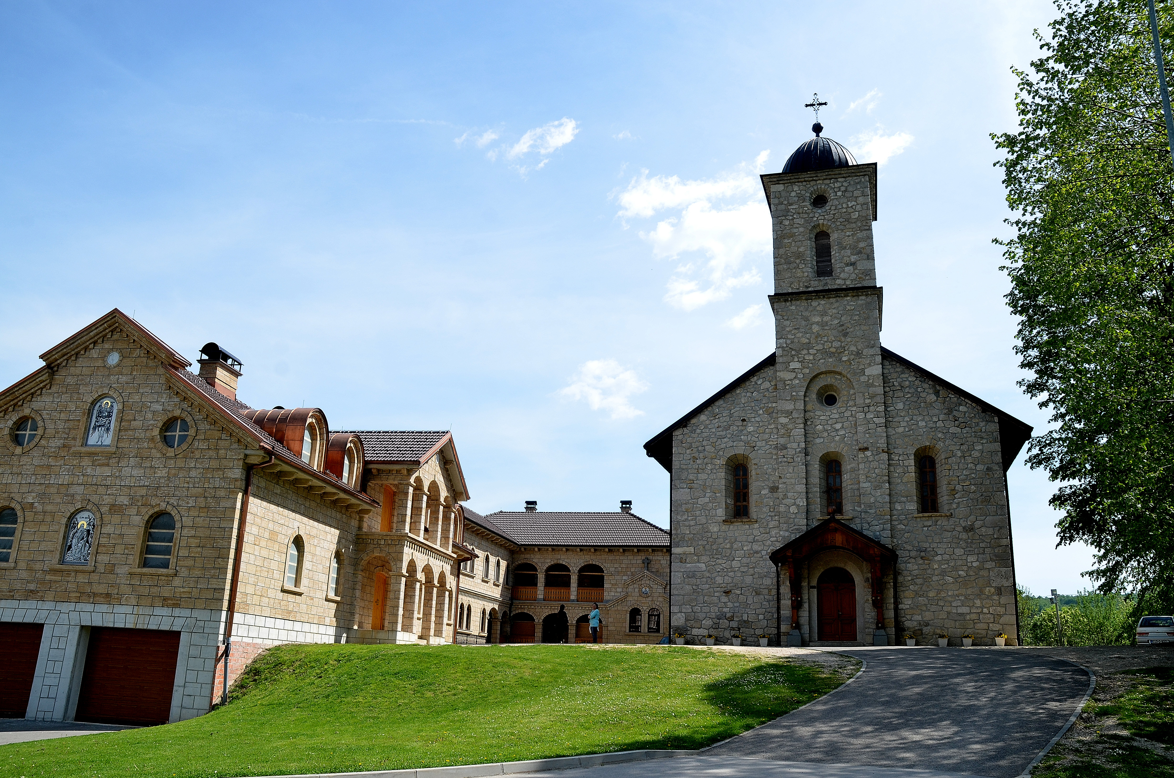 NKD 179 Manastir Krupa na Vrbasu, nalazi se na oko 25 km od Banja Luke